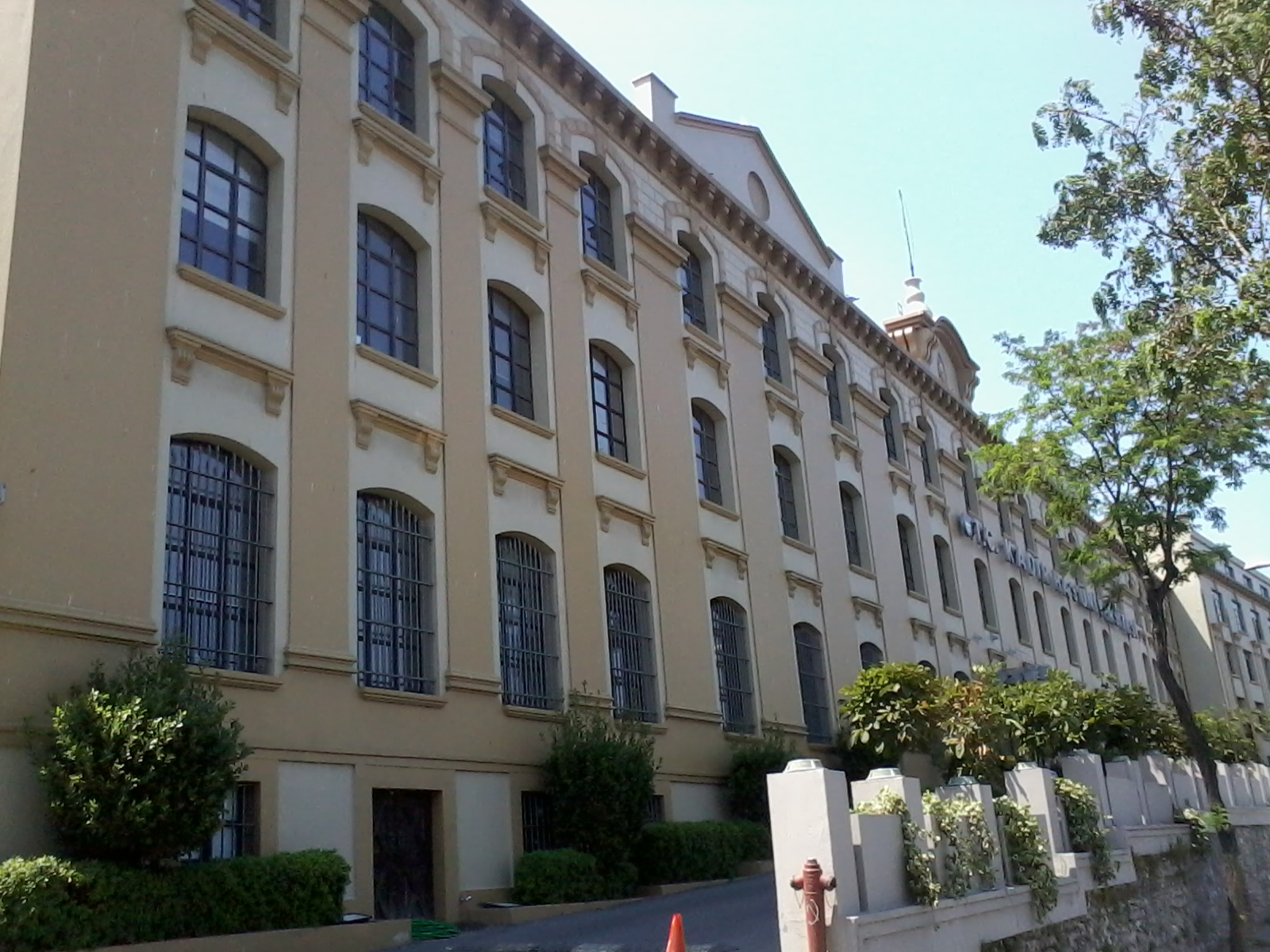 Eski Cibali Tutun Fabrikası Binası (Kadir Has Üniversitesi Yerleskesi)